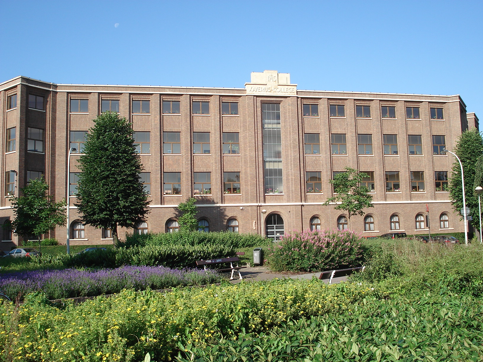 Collège Saint-François-Xavier à Borgerhout, Anvers. Façade principale. Erigé entre 1937 et 1940, arch. J. Taeymans.